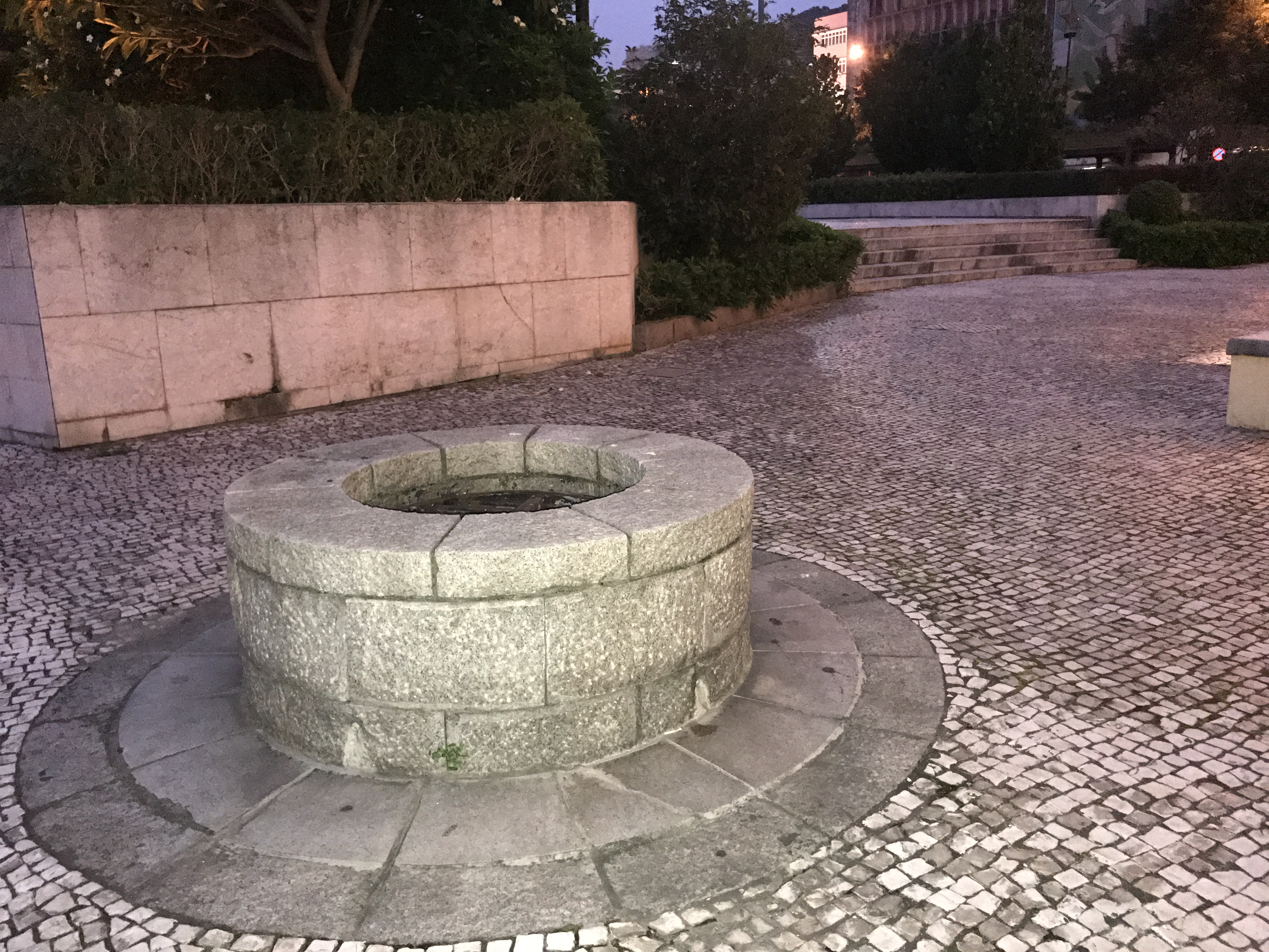 中文（台灣）: 澳門塔石廣場的一口古井